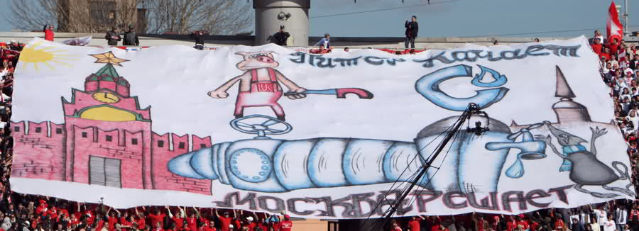 Акции Фратрии сезон 2011